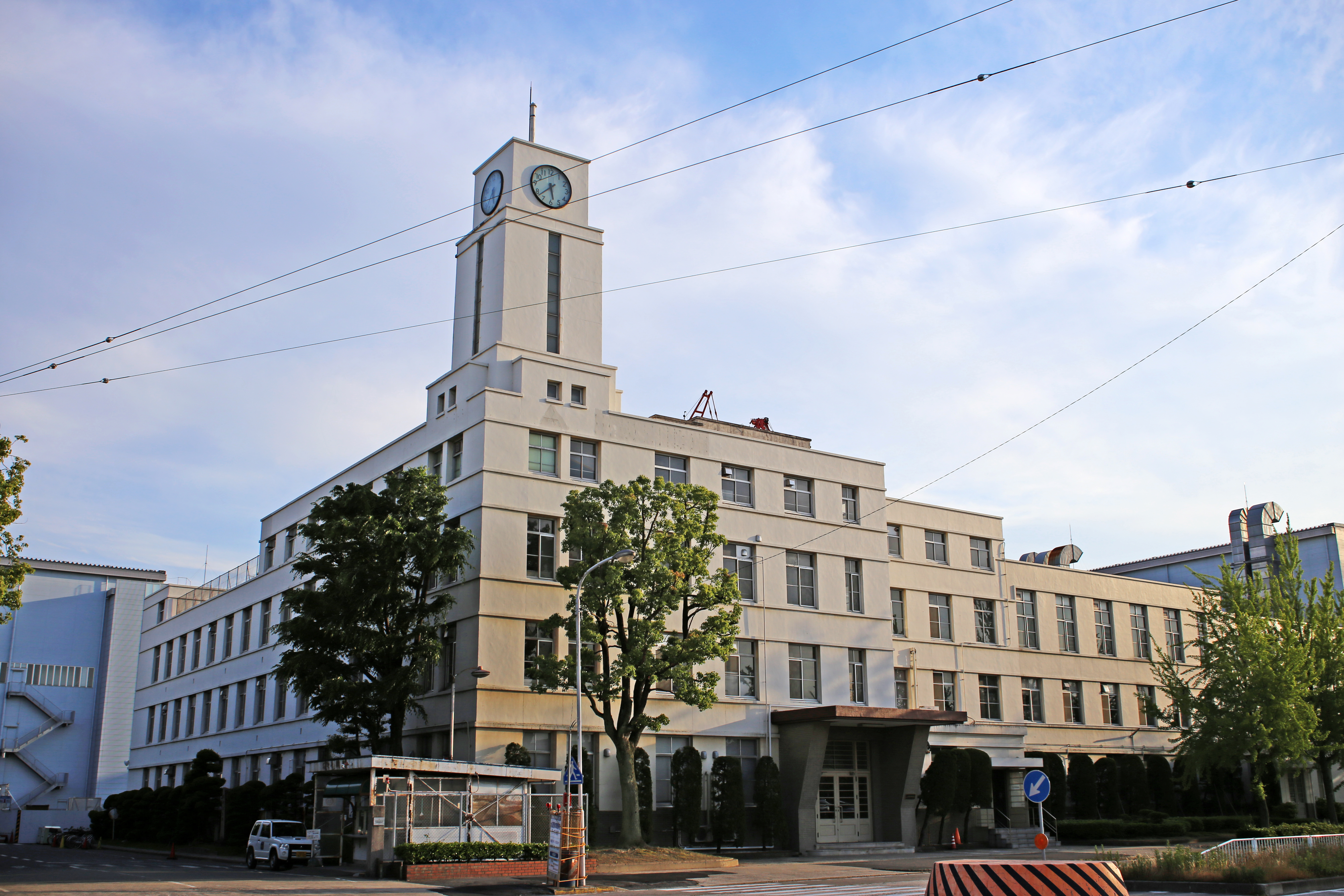 名古屋市港区大江町の三菱重工業大江工場内の通称「時計台」を北側公道東側より撮影